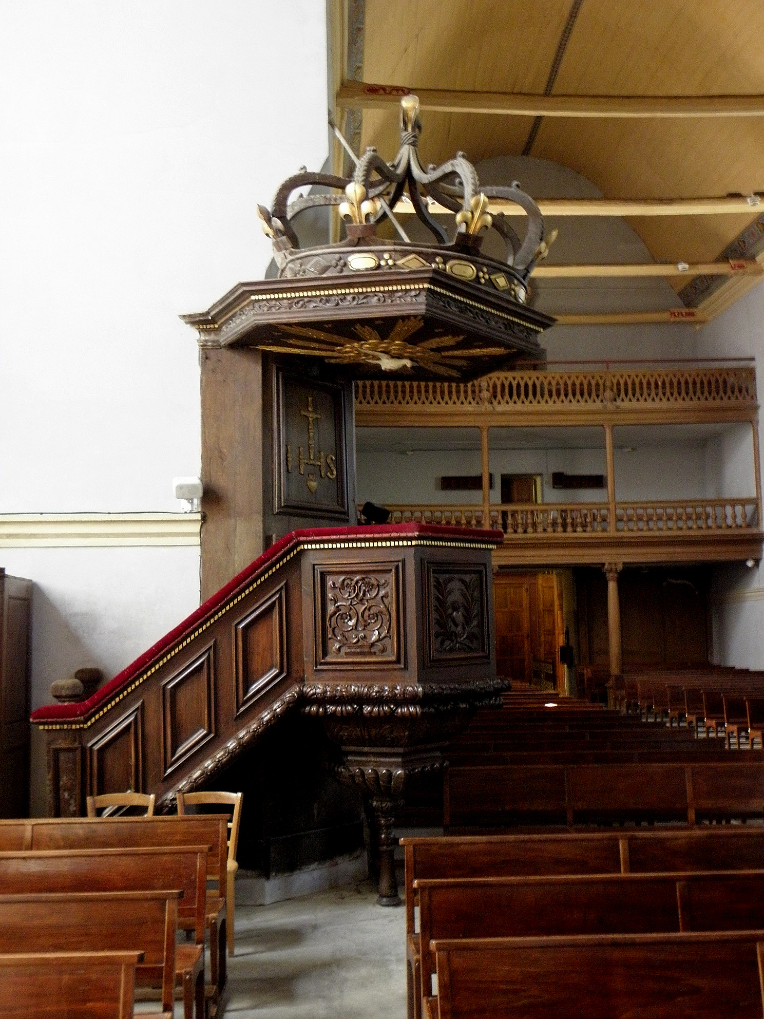 Chaire de l'église Saint-Ouen de Marcillé-Robert (35).